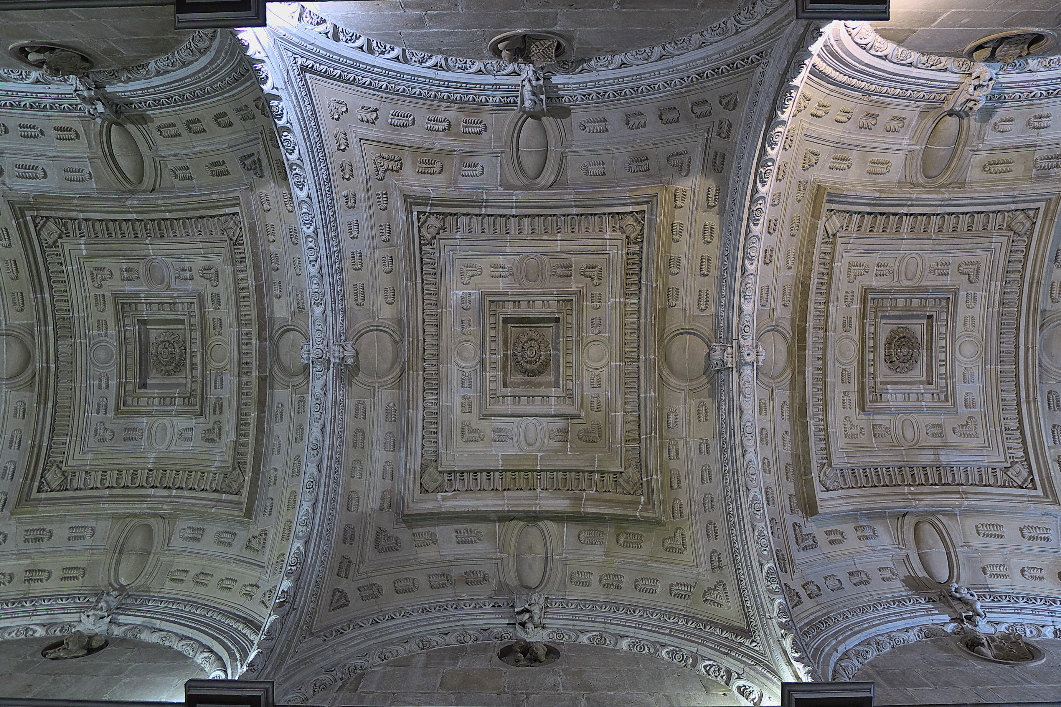 Andrés de Vandelvira diseña las bóvedas vaídas de la sacristía del templo funerario (ca. 1540). Arquitectura iniciada por Filippo Brunelleschi (1377-1446), Ospedale degli Innocenti, que introducirá y fomentará el alcaraceño en el Renacimiento español. Esteban Jamete (1541-1543) colabora en la escultura para exponer el programa iconográfico de las tres edades del mundo, según indicaciones de Fernando Ortega Salido, deán de la Catedral de Málaga.